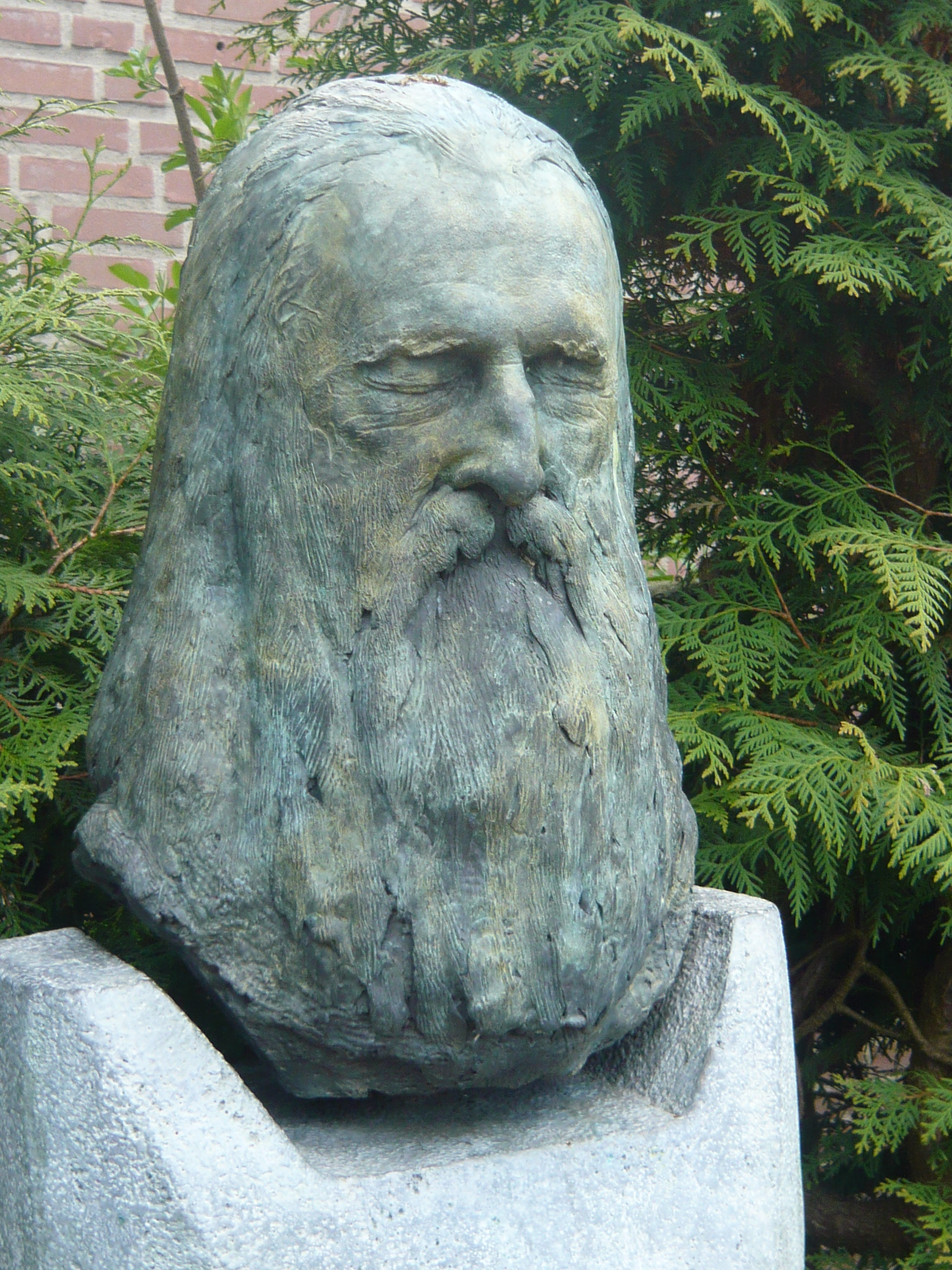 Grab von Moondog (Kopf)